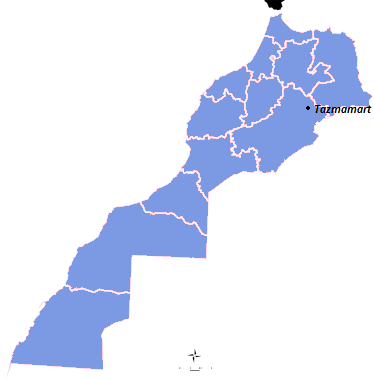 tazmamart